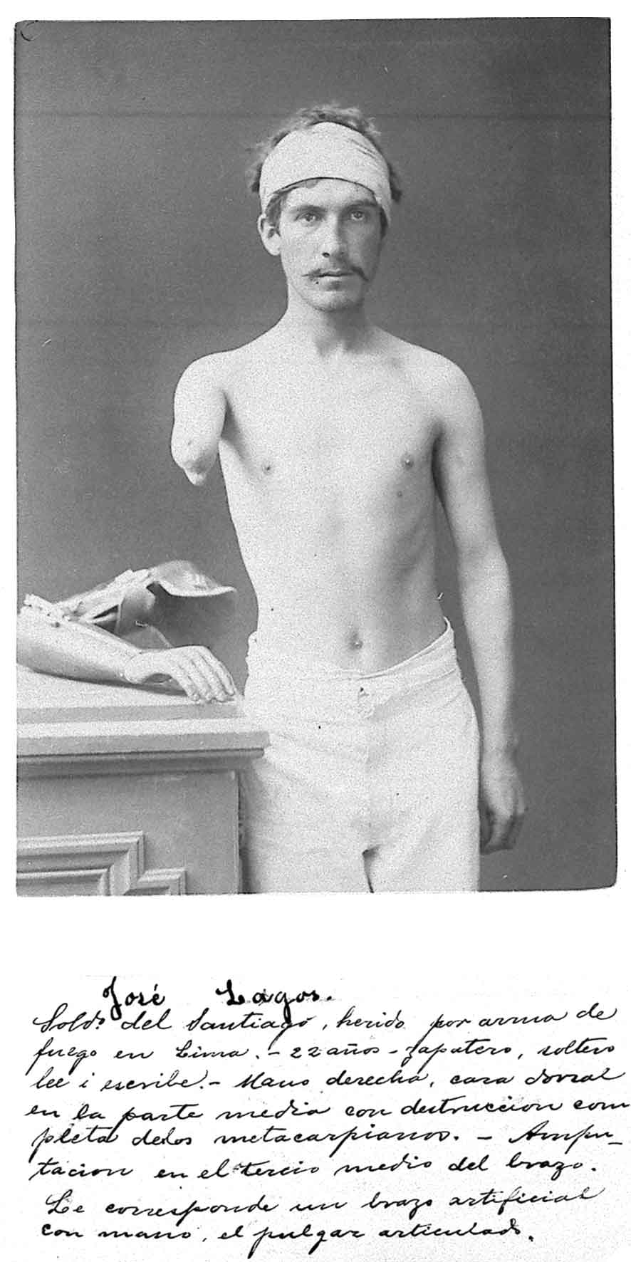 Sargento José Lagos del Rgto Santiago